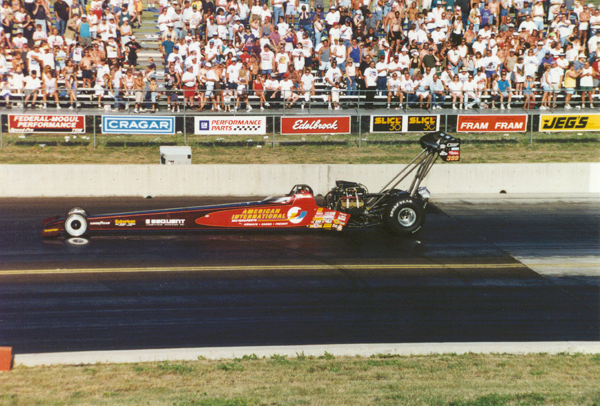 NHRA driver Connie Kalitta Top Fuel Dragster at DenverConnie Kalitta